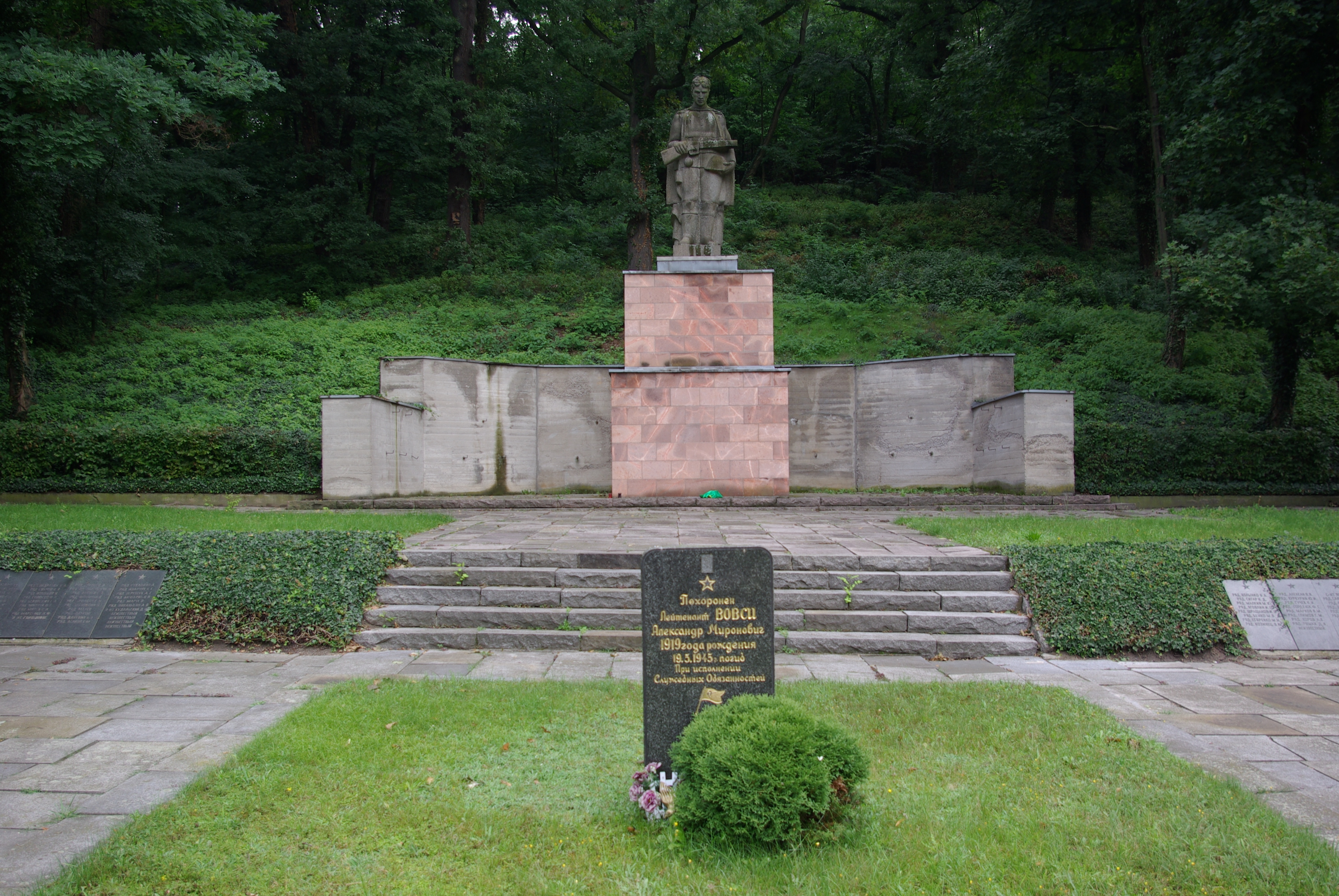 Bad Freienwalde in Brandenburg. Der Sowjetische Friedhof an der Berliner Straße steht unter Denkmalschutz.